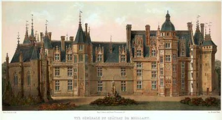 Château de Meillant, près de Bourges (CHER)